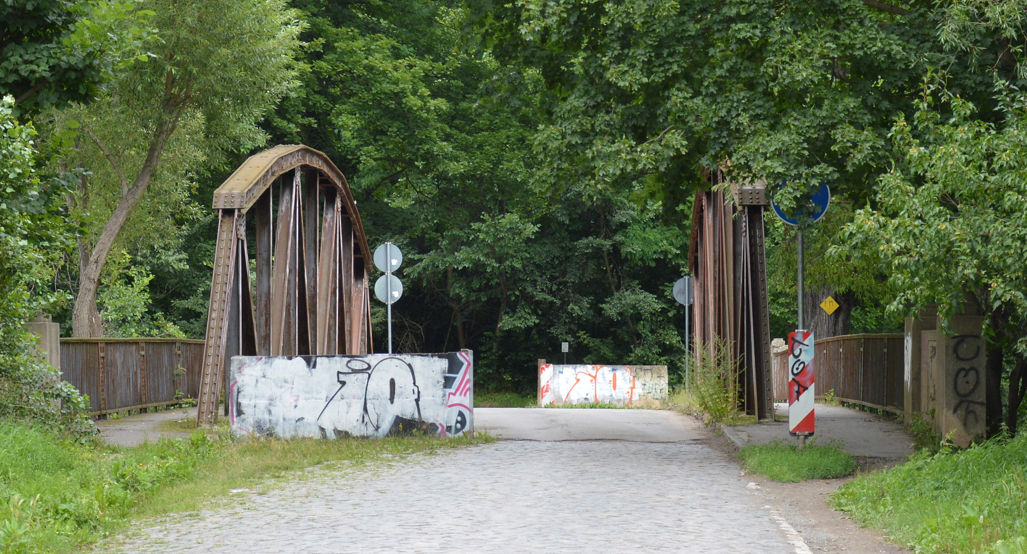 Schafbrücke Fahrbahn